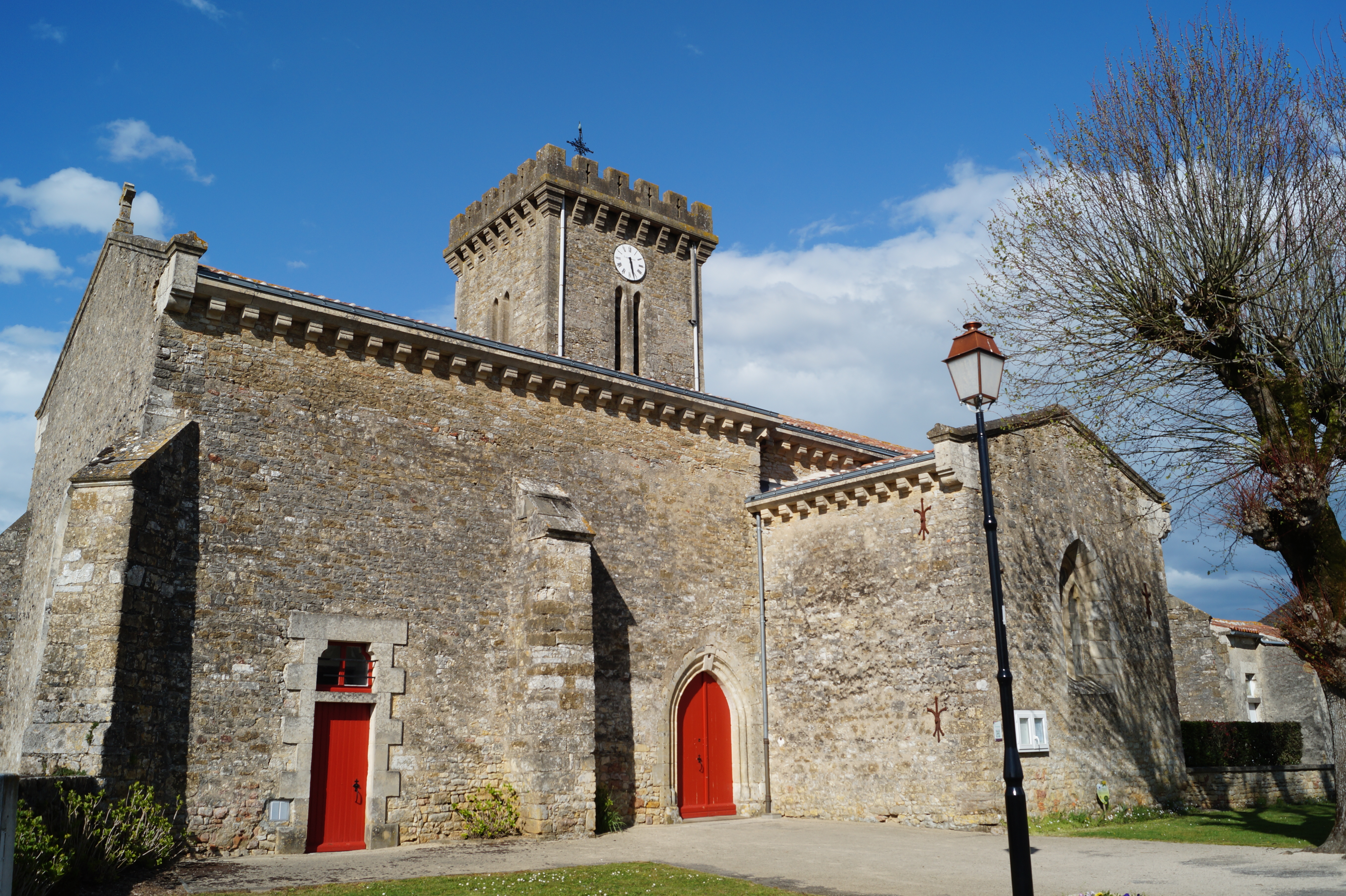 L’église Notre-Dame-de-l’Assomption de Thouarsais depuis l’impasse du Château.